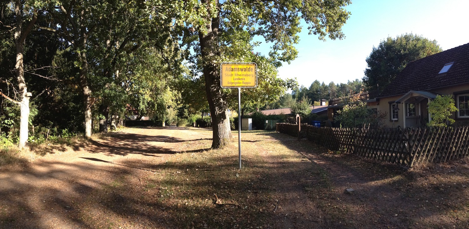 Das Bild zeigt die Zufahrt nach Adamswalde aus Richtung Kleinzerlang